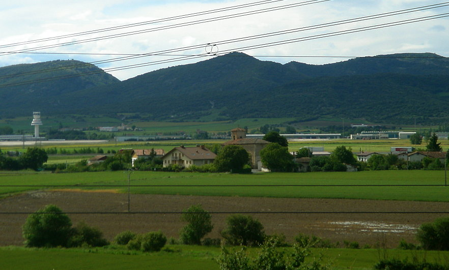 Lopida (Gasteiz) / Lopidana (Vitoria)